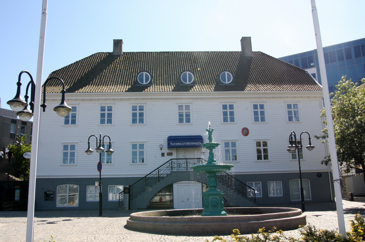 Rosenkildehuset